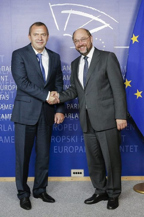 Arbeitsbesuch des Sekretärs des Nationalen Sicherheits- und Verteidigungsrates der Ukraine, Andrij Kljujew, am 18. September 2013 in Brüssel.